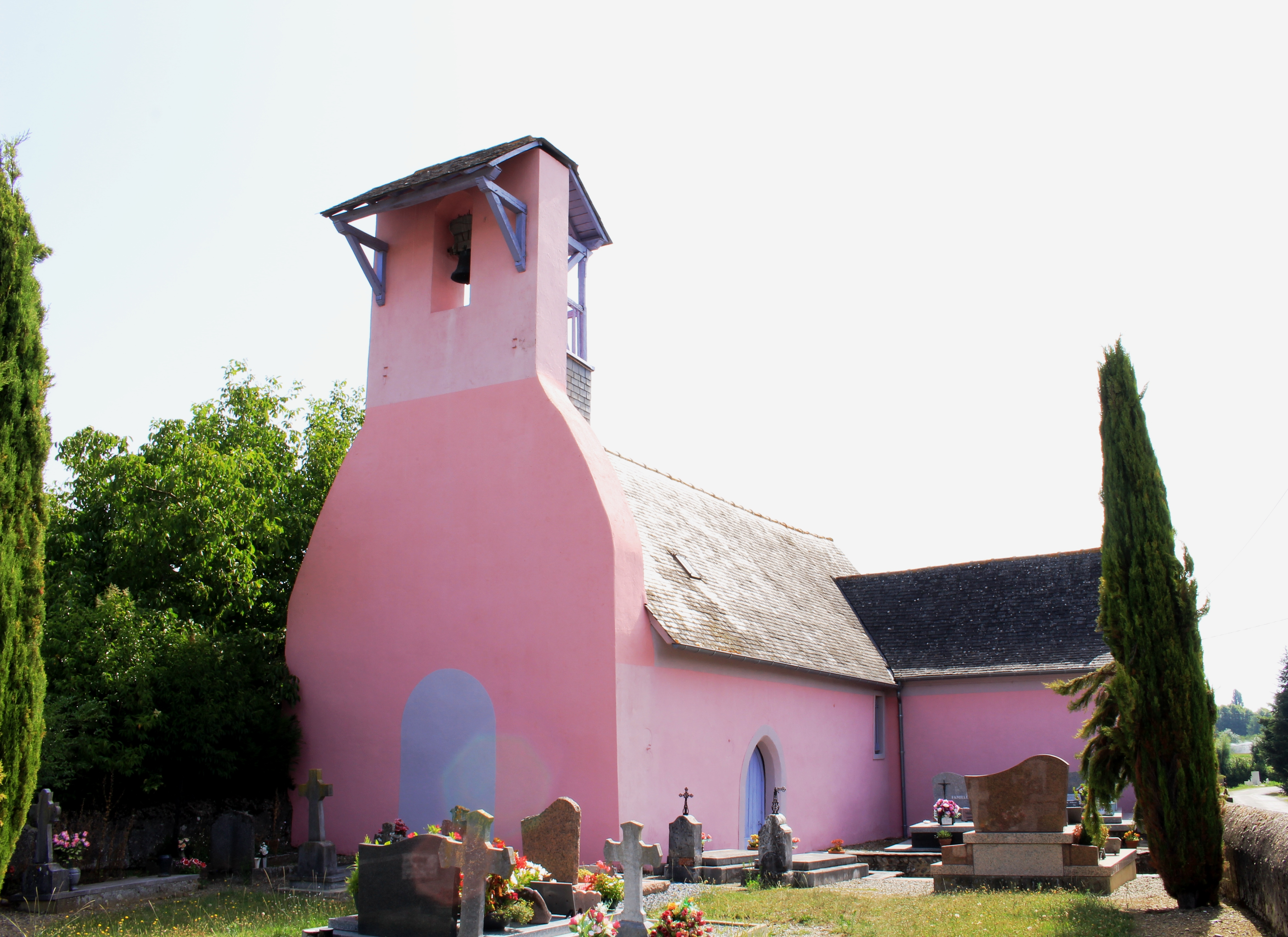 Église Sainte-Eulalie de Talazac (Hautes-Pyrénées)